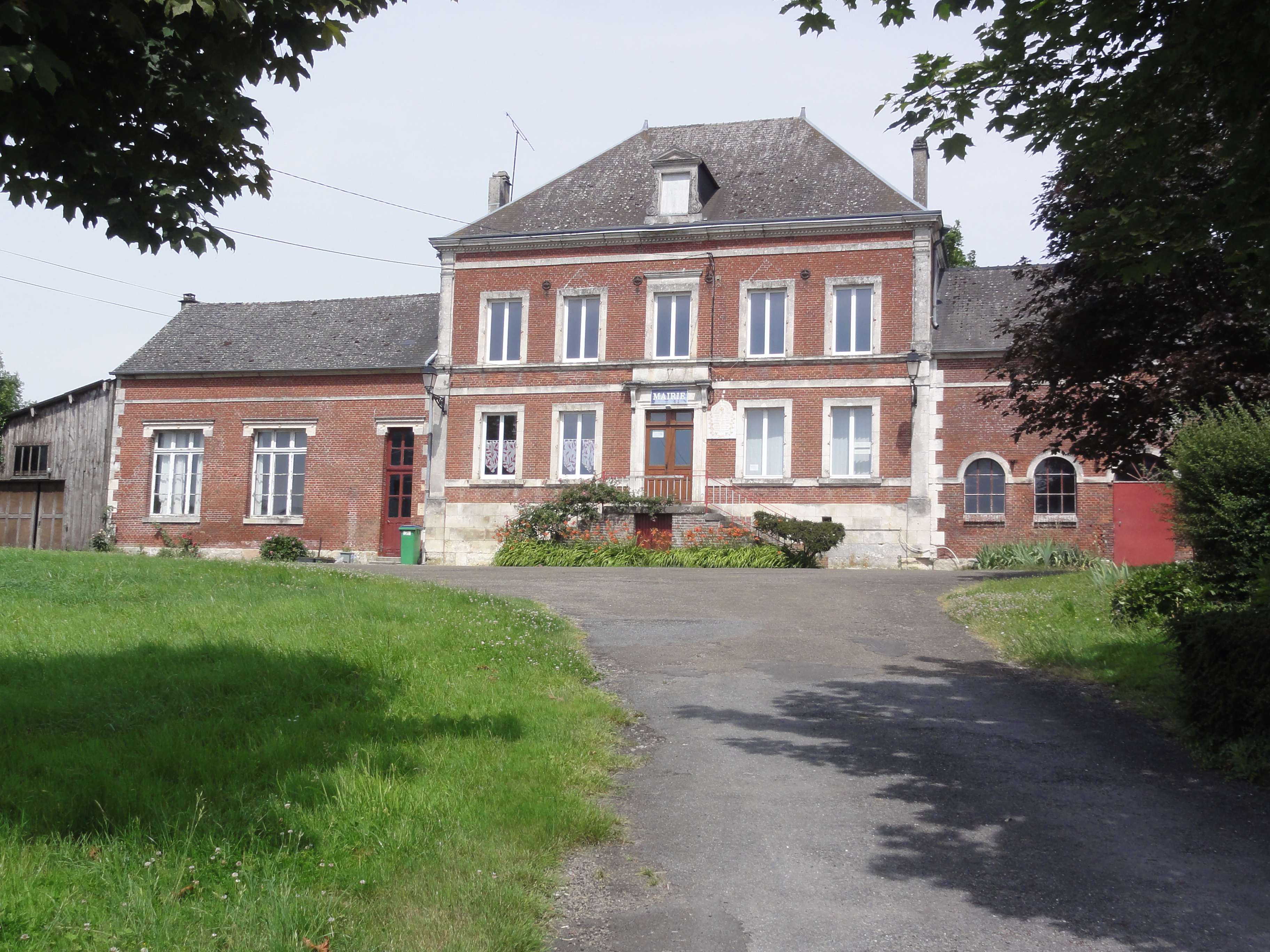 Grandrieux (Aisne) mairie